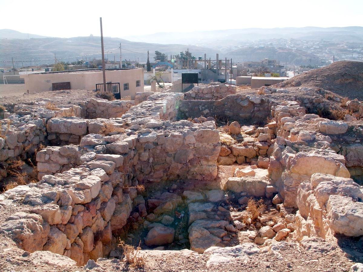 שרידי העיר האדומית בצרה בקצה הכפר בוצירה. על התל הוקם בית ספר שניתן לראות משמאל את שער הכדורגל שבחצרו photo by Uri Juda